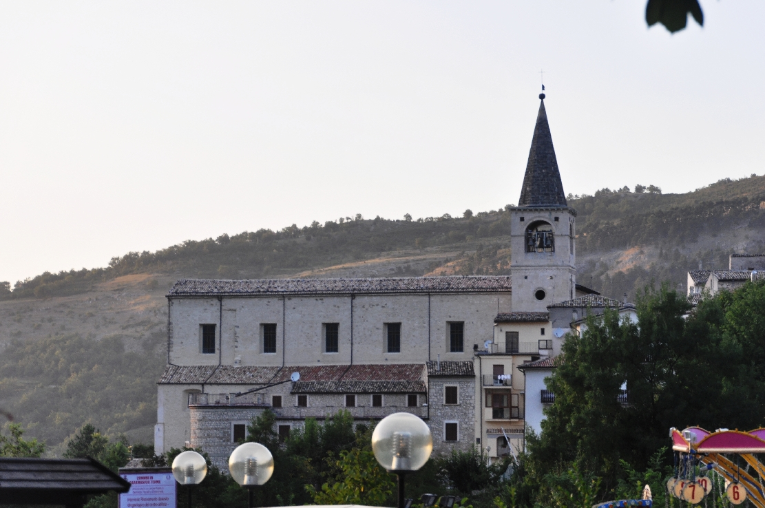 Caramanico Terme 2014